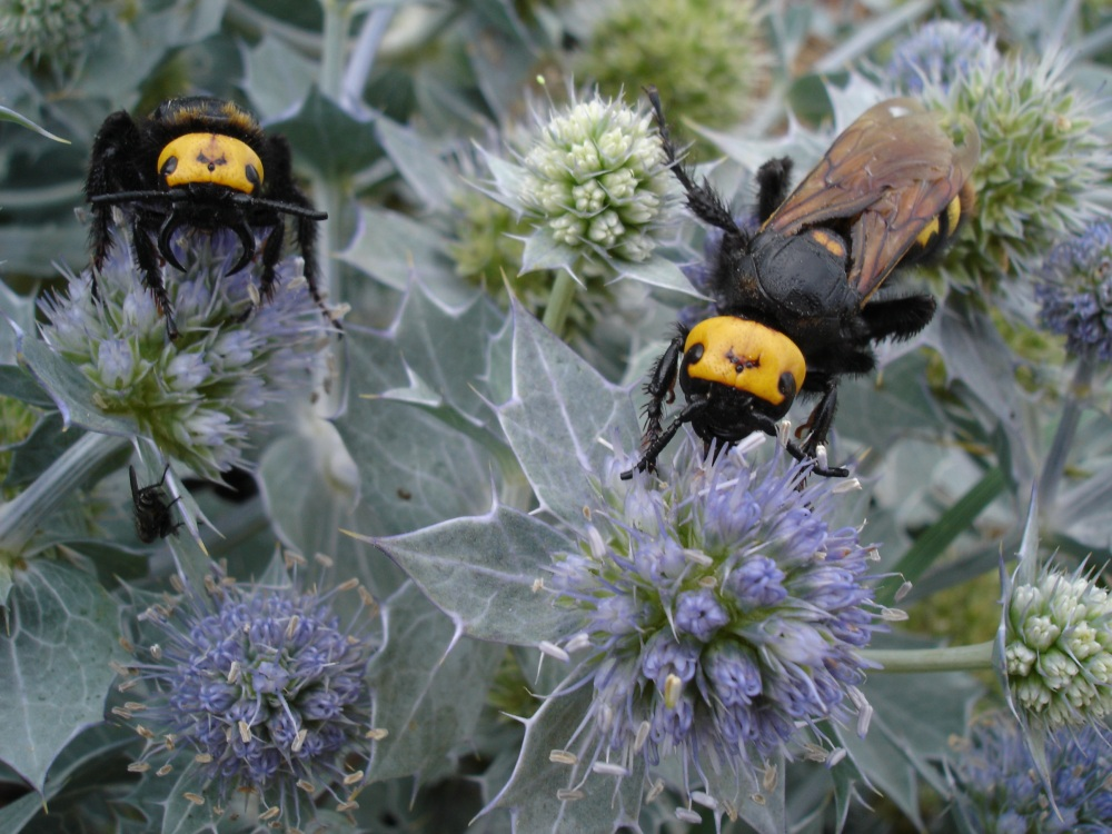 Scolia maculata, Cap de L'Homy Plage (Landes)